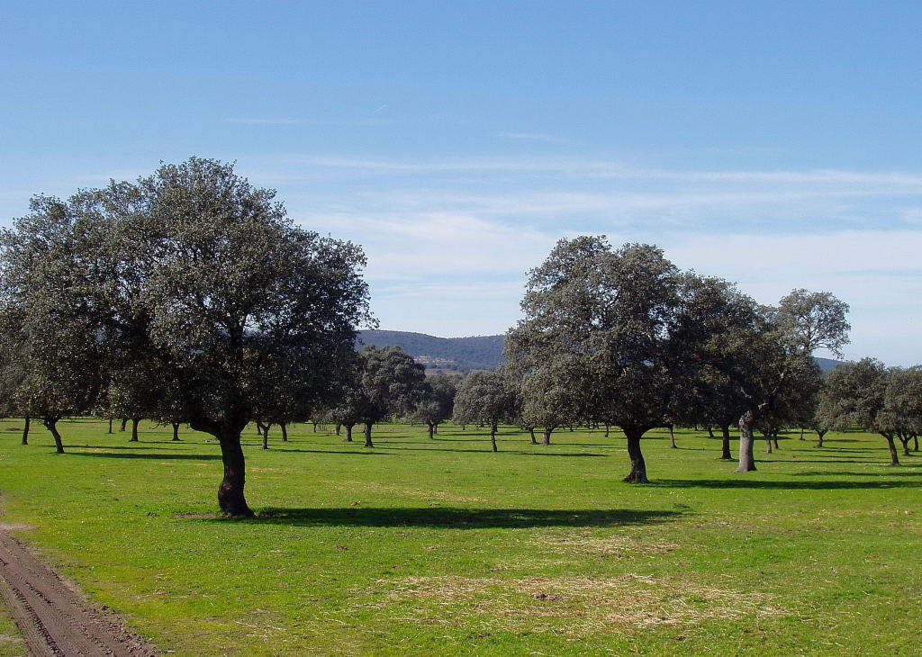 Dehesa extremeña Dehesa Vieja (Saucedilla, provincia de Cáceres)